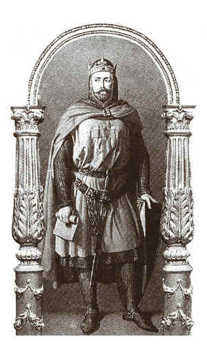 Тибо IV Граф Шампани